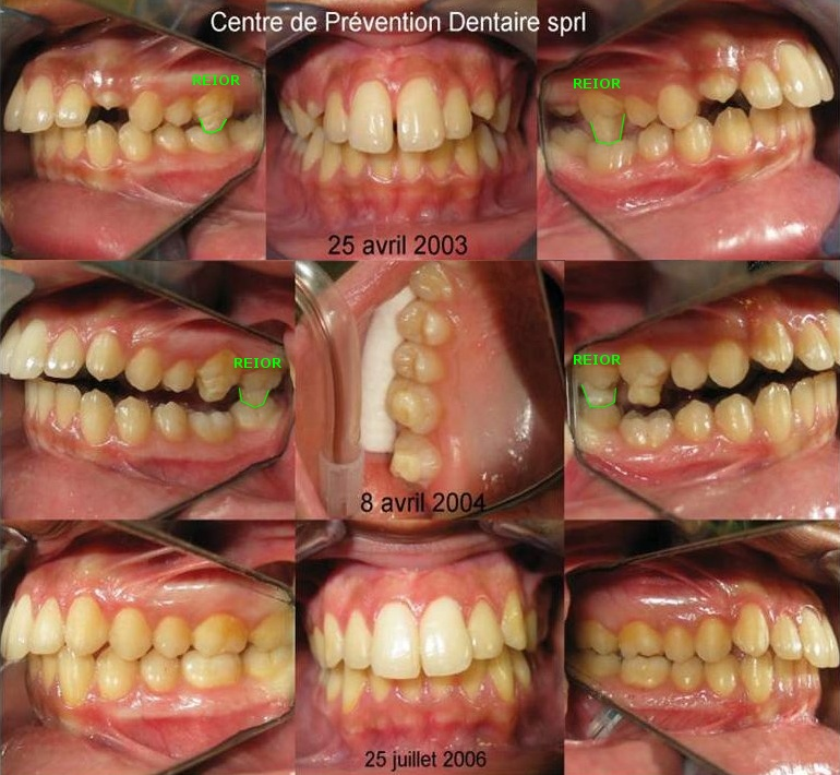 Interception de la déglutition infantile par augmentation iatrogène de la hauteur clinique des dents : REIOR et GAL qui n'entravent pas l'Espace libre physiologique - - (c) CPD sprl, 2006 et suiv.